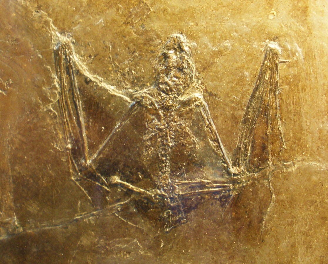 Fossil of Palaeochiropteryx, an extinct bat Took the photo at Musee d'Histoire Naturelle, Brussels